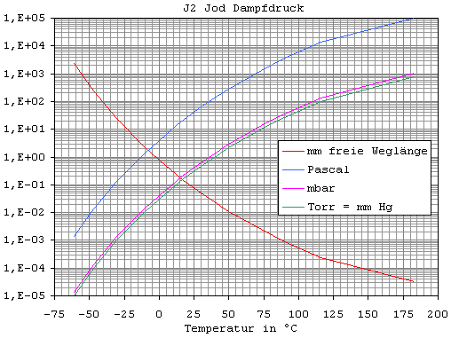 Der Sättigungsdampfdruck von Iod-Dampf I2, und die Mittlere freie Weglänge, in Abhängigkeit von der Temperatur. Gezeichnet am 4. April 2006 mit Hilfe von Microsoft Excel und Microsoft Paint. Die numerischen Angaben zum Dampfdruck stammen von hier: Die Berechnung der mittleren freien Weglänge stammt von hier: Benutzer:Karl Bednarik Copyright Status: GNU Freie Dokumentationslizenz Externer Link